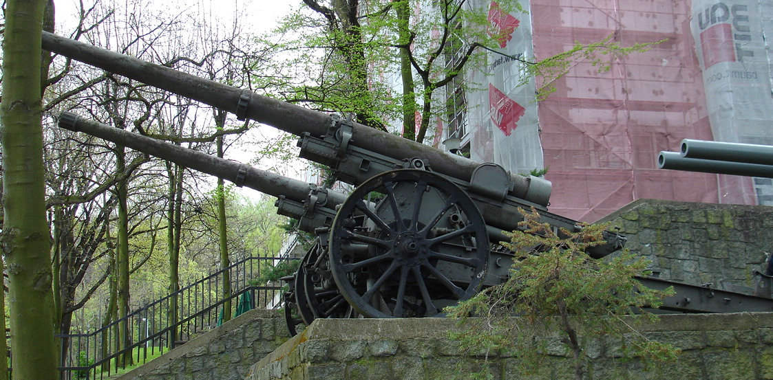 Muzeum Marynarki Wojennej Rzeczypospolitej Polskiej